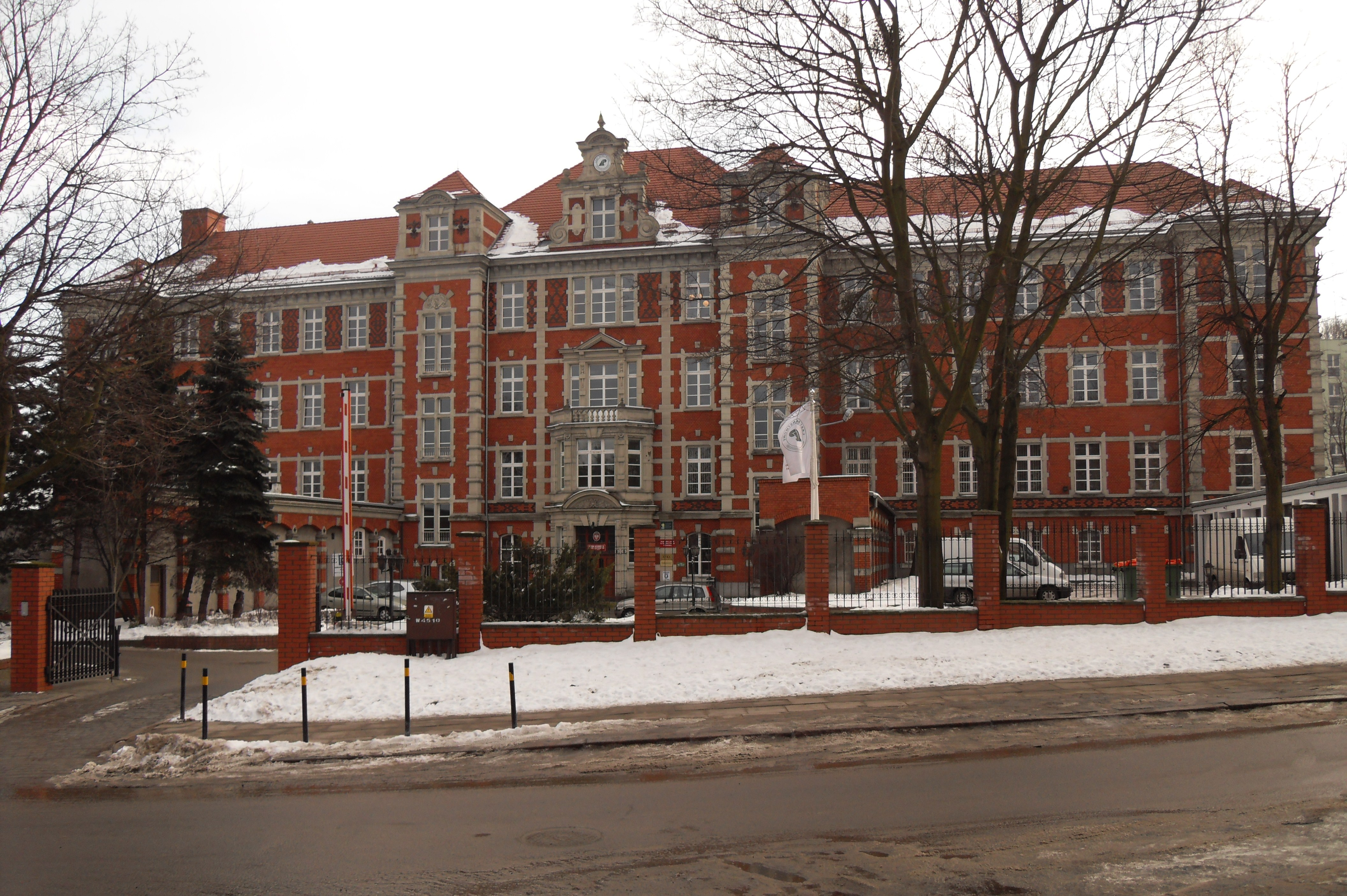 Gmach dawnego szpitala miejskiego z 1887 roku, później Städtishes Arbeitshaus, obecnie Regionalna Dyrekcja Lasów Państwowych w Gdańsku, ul. Rogaczewskiego 9/19.